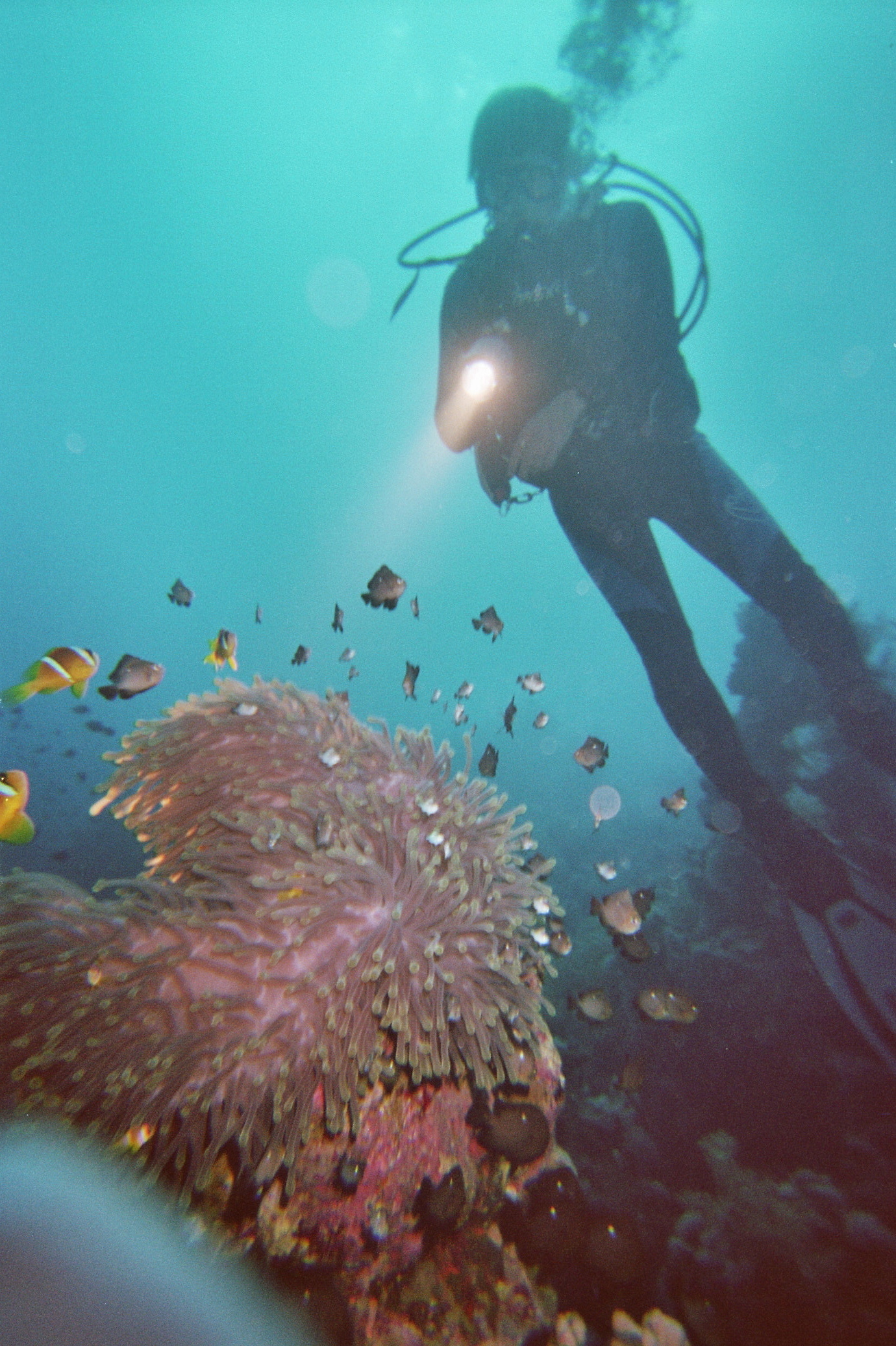 الحياة البحرة في شرم الشيخ. الغواص على الشعاب المرجانية.